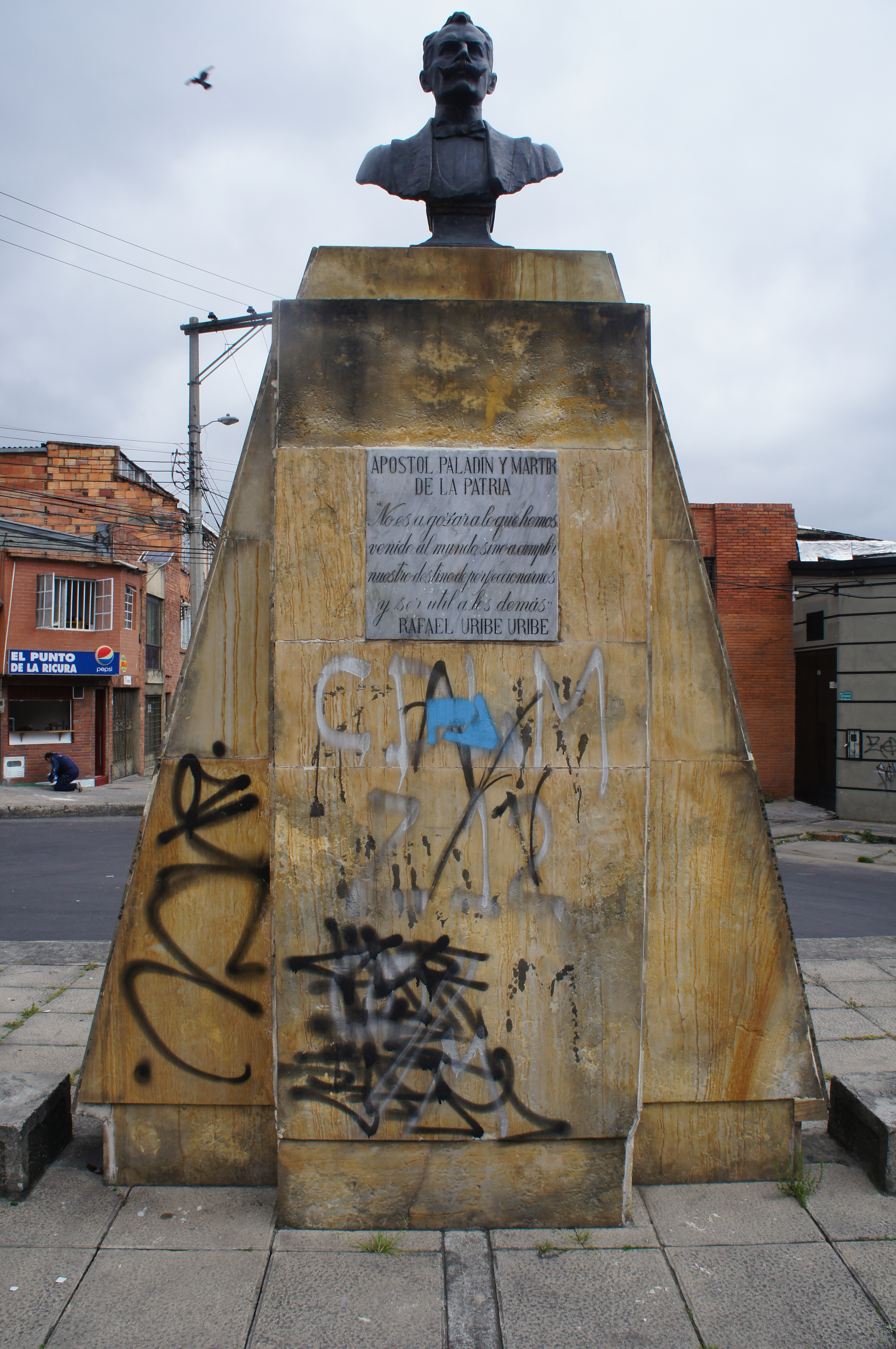 Autor: Silvano Cuéllar. ca. 1914 - 1938. Barrio La Merced Norte, Bogotá.